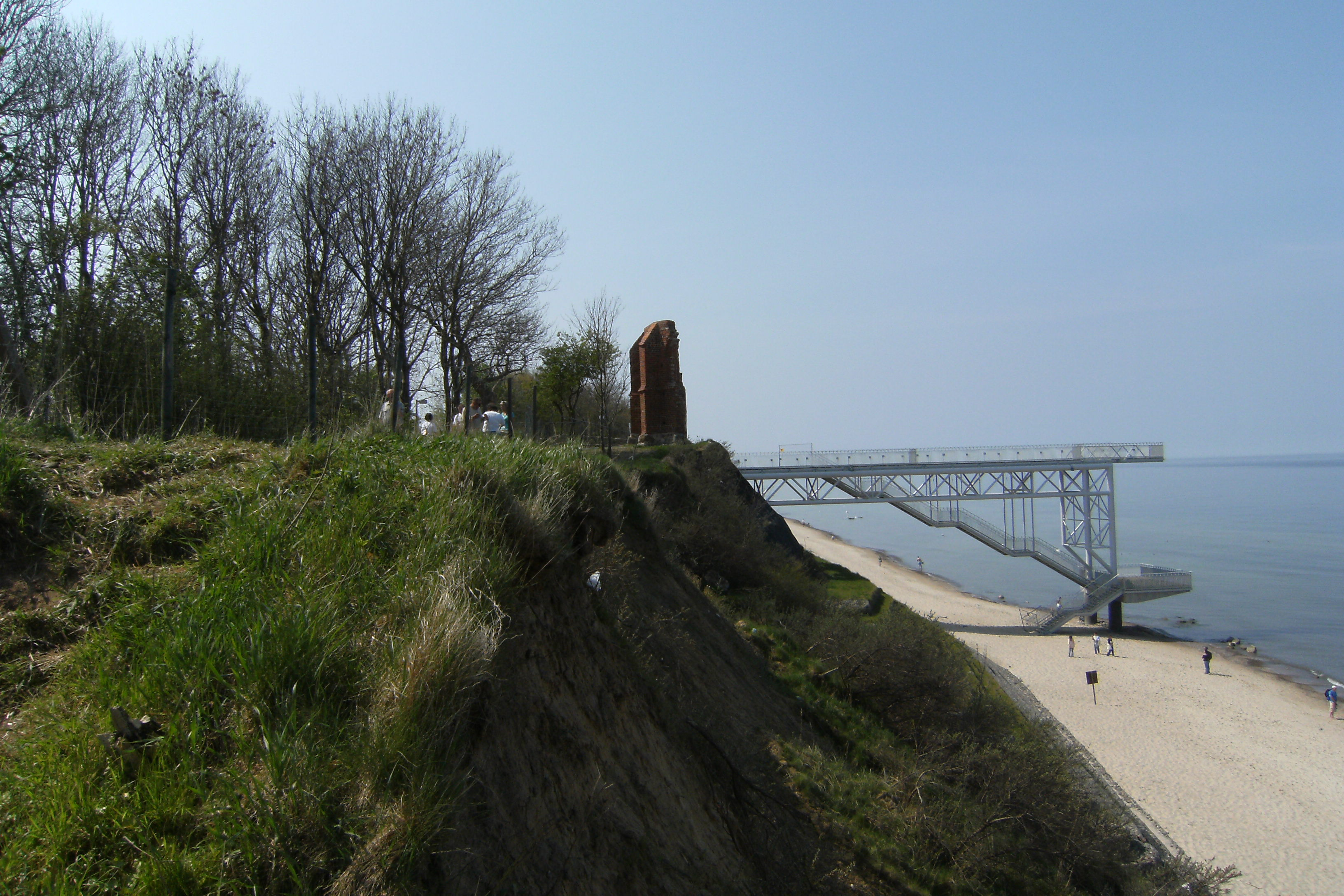 Ruine Hoff von Osten mit Aufgangbrücke